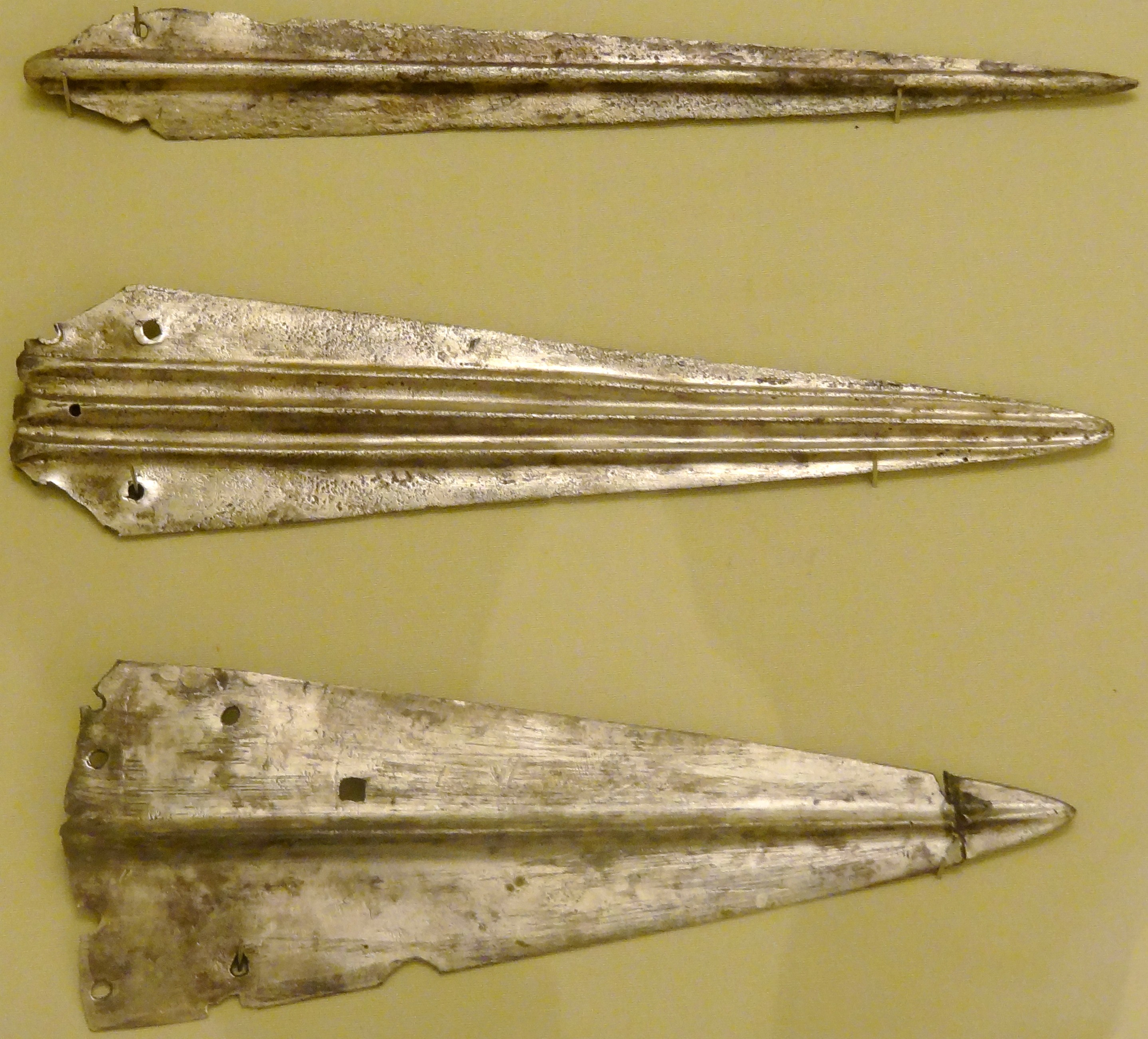 Minoische Silberdolche (Vorpalastzeit, 2800–2300 v. Chr.) aus Tekes (Iraklio), Platanos und Koumasa (Messara), ausgestellt im Archäologischen Museum Iraklio, Kreta, Griechenland